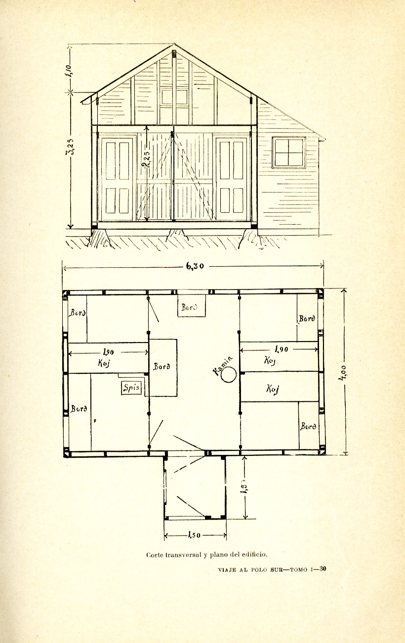 Otto Nordenskjold. "Viaje al Polo Sur". Barcelona 1904. Plano de la cabaña de la invernada 1902-1904. Página 233